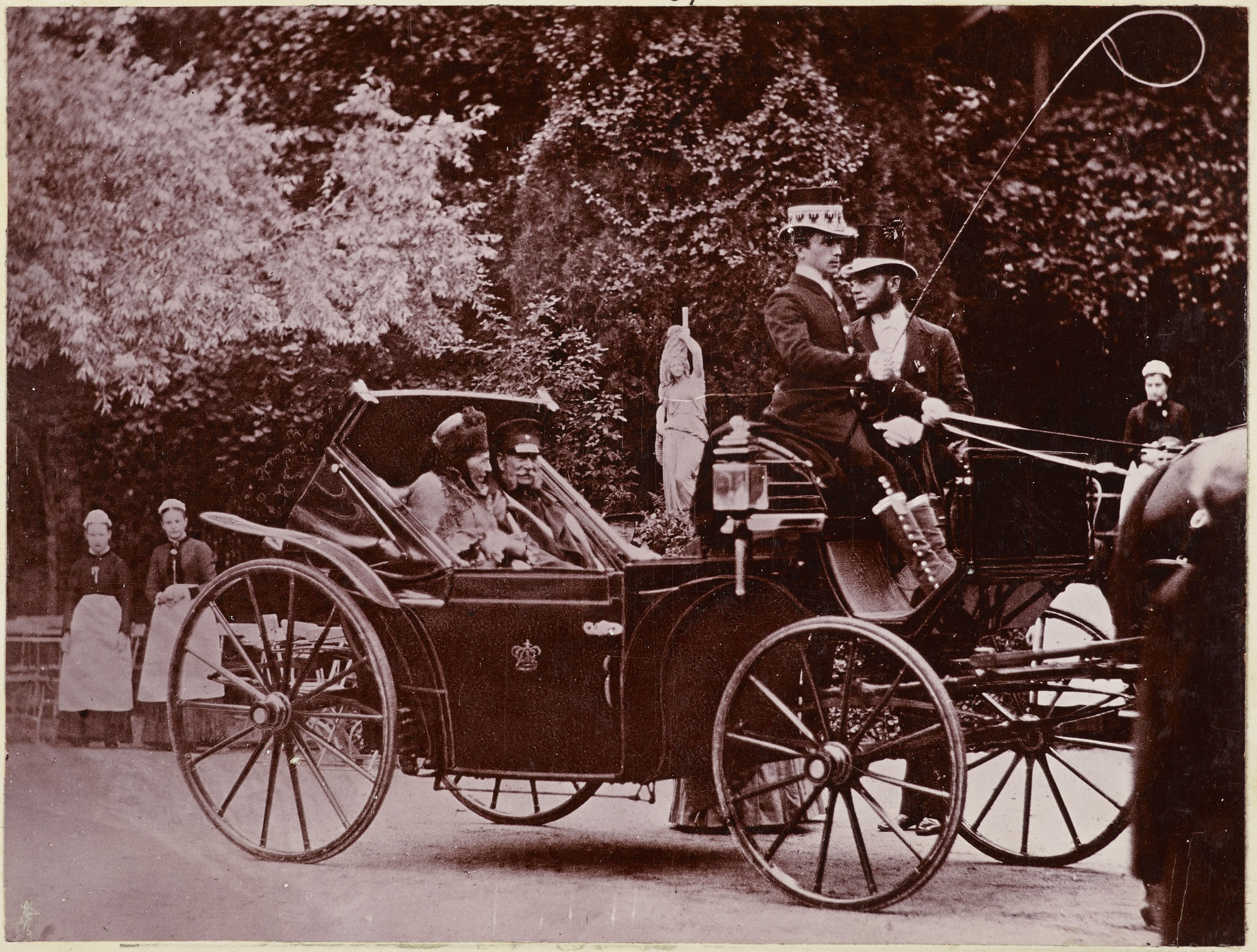 Augusta von Sachsen-Weimar-Eisenach and Wilhelm I. Friedrich Ludwig in Koblenz